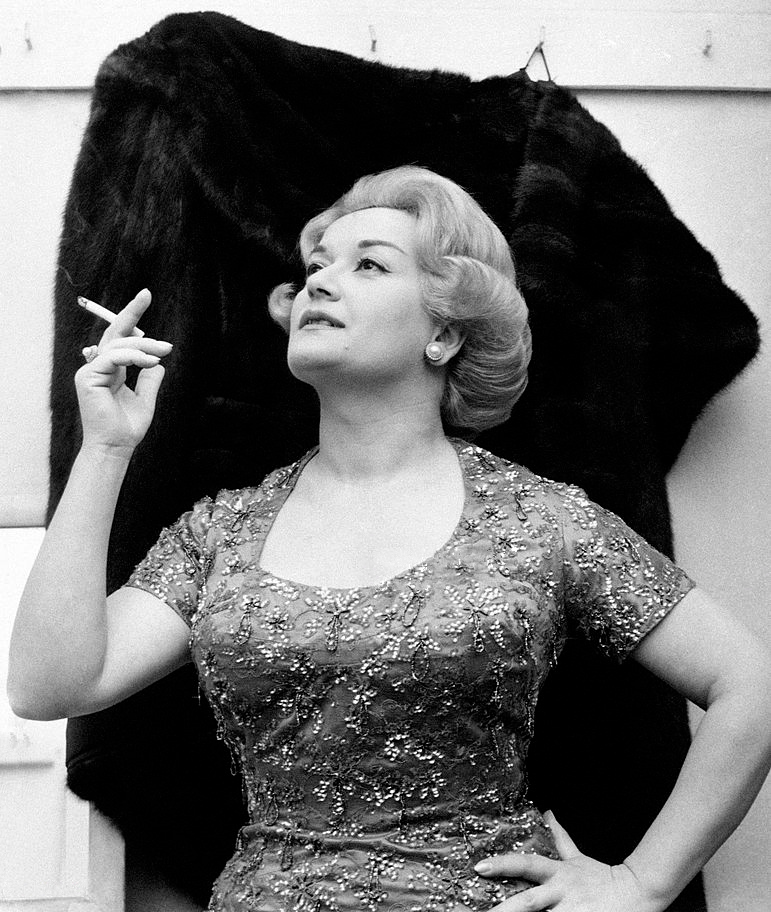 Flo Sandon's